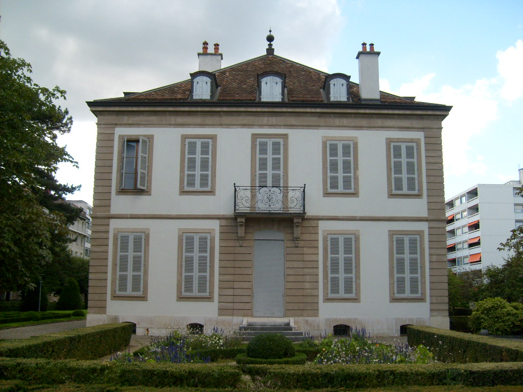 Maison Les Délices et son jardin à Genève